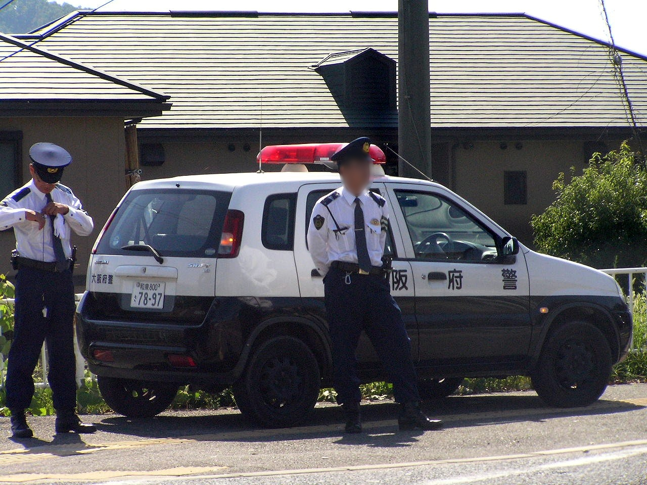 大阪府警警官とパトロールカー